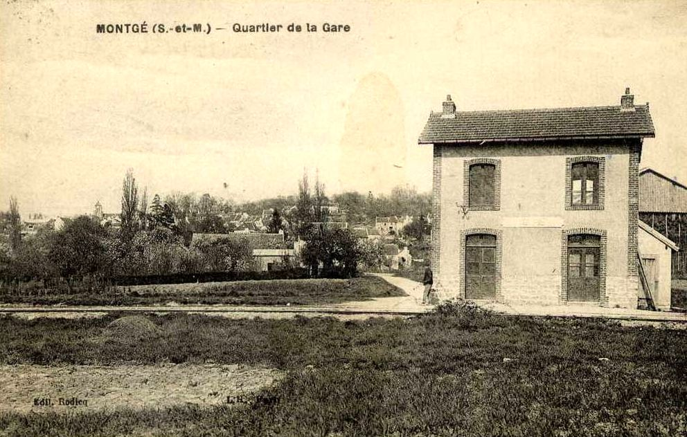 Le bâtiment-voyageurs de la gare de Montgé après son rehaussement, effectué en 1915 après un début de travaux en juillet 1914.